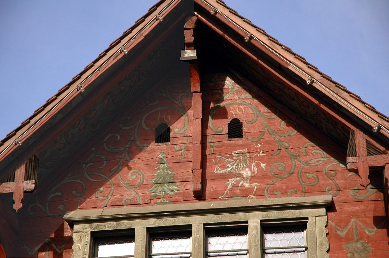 Dieses Bild zeigt das Wappen der Familie Danner und Rhomberg unter dem Dachgiebel des Rotem Hauses - Wahrzeichen von Dornbirn.